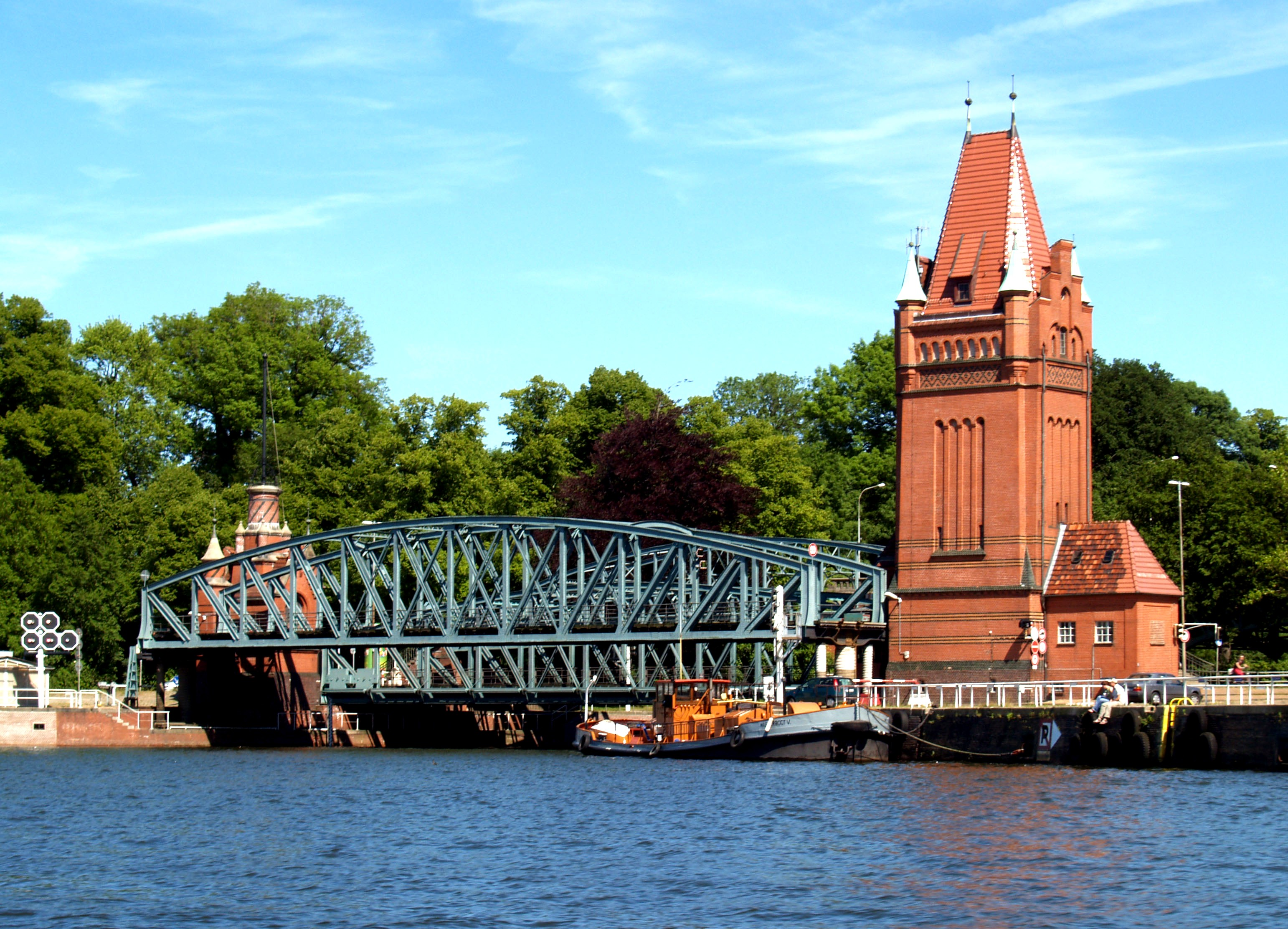 Hubbücke (Lübeck) over Elbe-Luebeck-Kanal